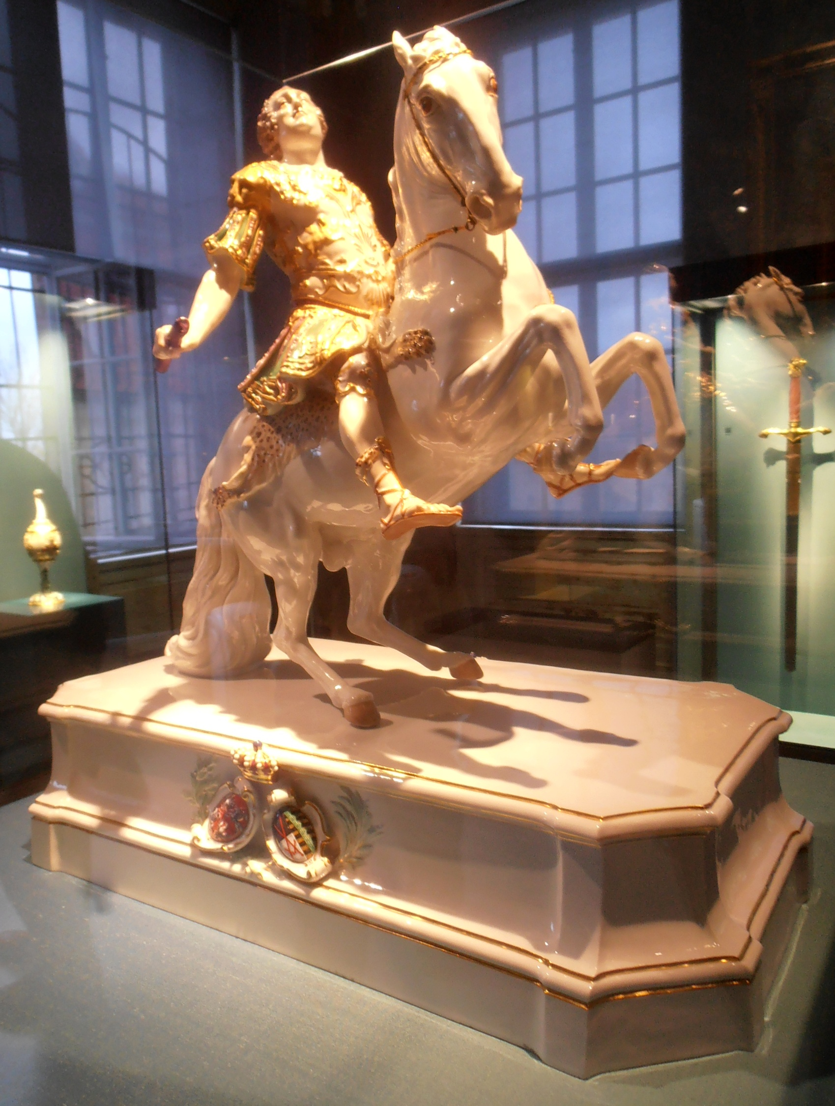 Reiterstatuette König Augusts III Meißen um 1918 Modell: Joachim Kaendler und Johann Friedrich Eberlein, 1745 Porzellan, Gold, Bronze Marke: unterglasurblaue gekreuzte Schwerter Porzellansammlung der Staatlichen Kunstsammlungen Dresden (PE 649) Hier in der Ausstellung "Die königliche Jagdresidenz Hubertusburg und der Frieden von 1763" in Schloss Hubertusburg